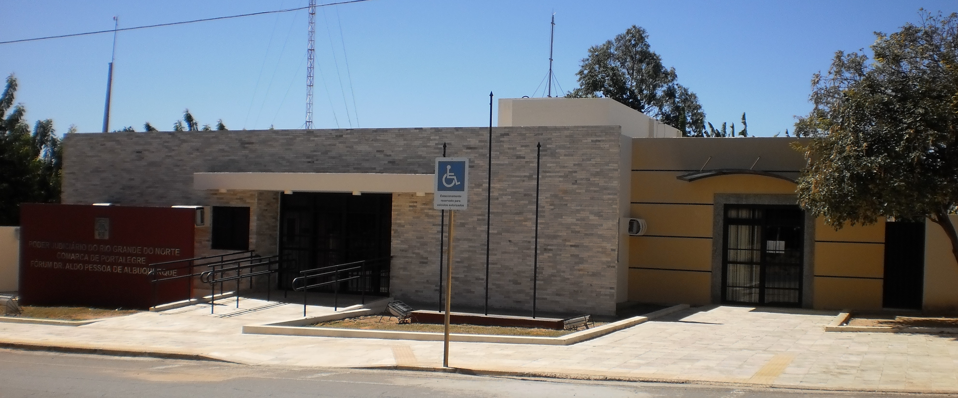 Fórum Dr. Aldo Pessoa de Albuquerque, sede da Comarca de Portalegre, do Poder Judiciário do Rio Grande do Norte, Brasil.